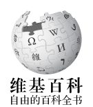 维基百科简体字标志